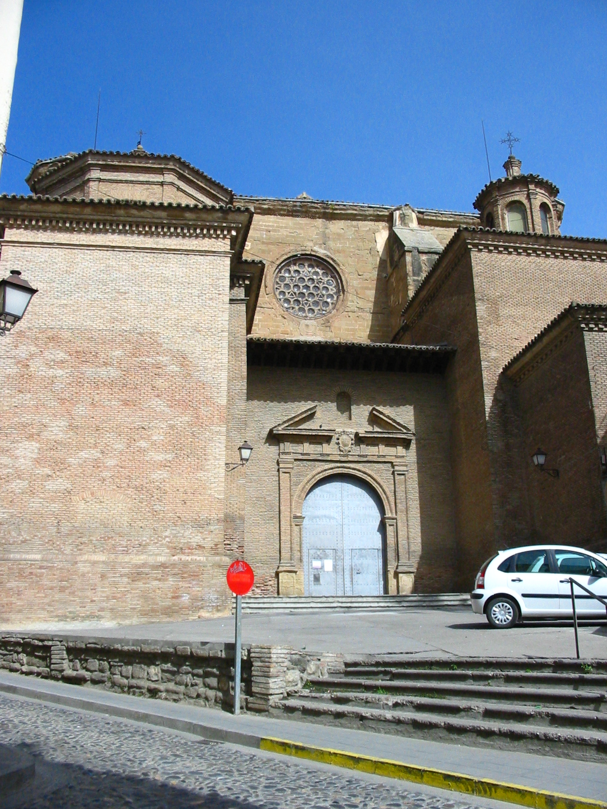 Historia del Entremuro